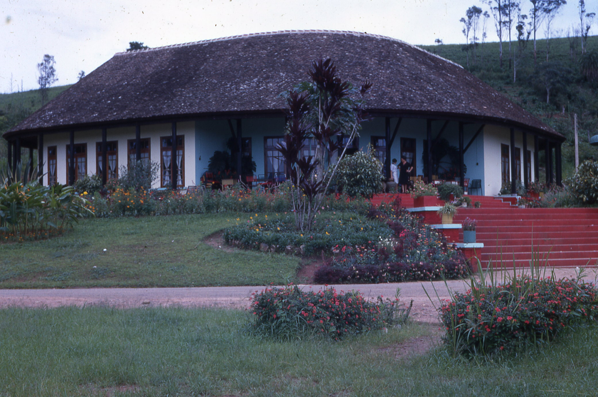 Pendant la saison des pluies, le soleil manque un peu mais la végétation est verte. Sur la terrasse en haut des escaliers, la patronne, Madame Saulières s'entretient avec un employé ou un visiteur.